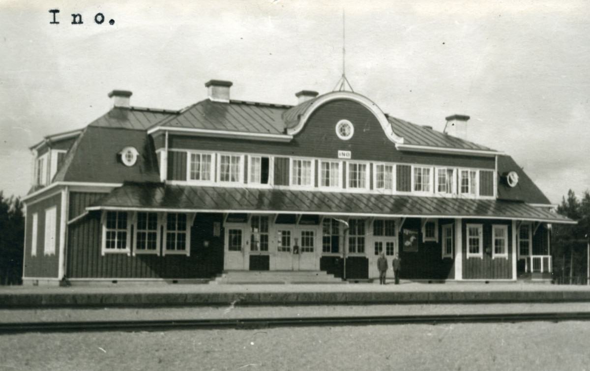 Приветнинское